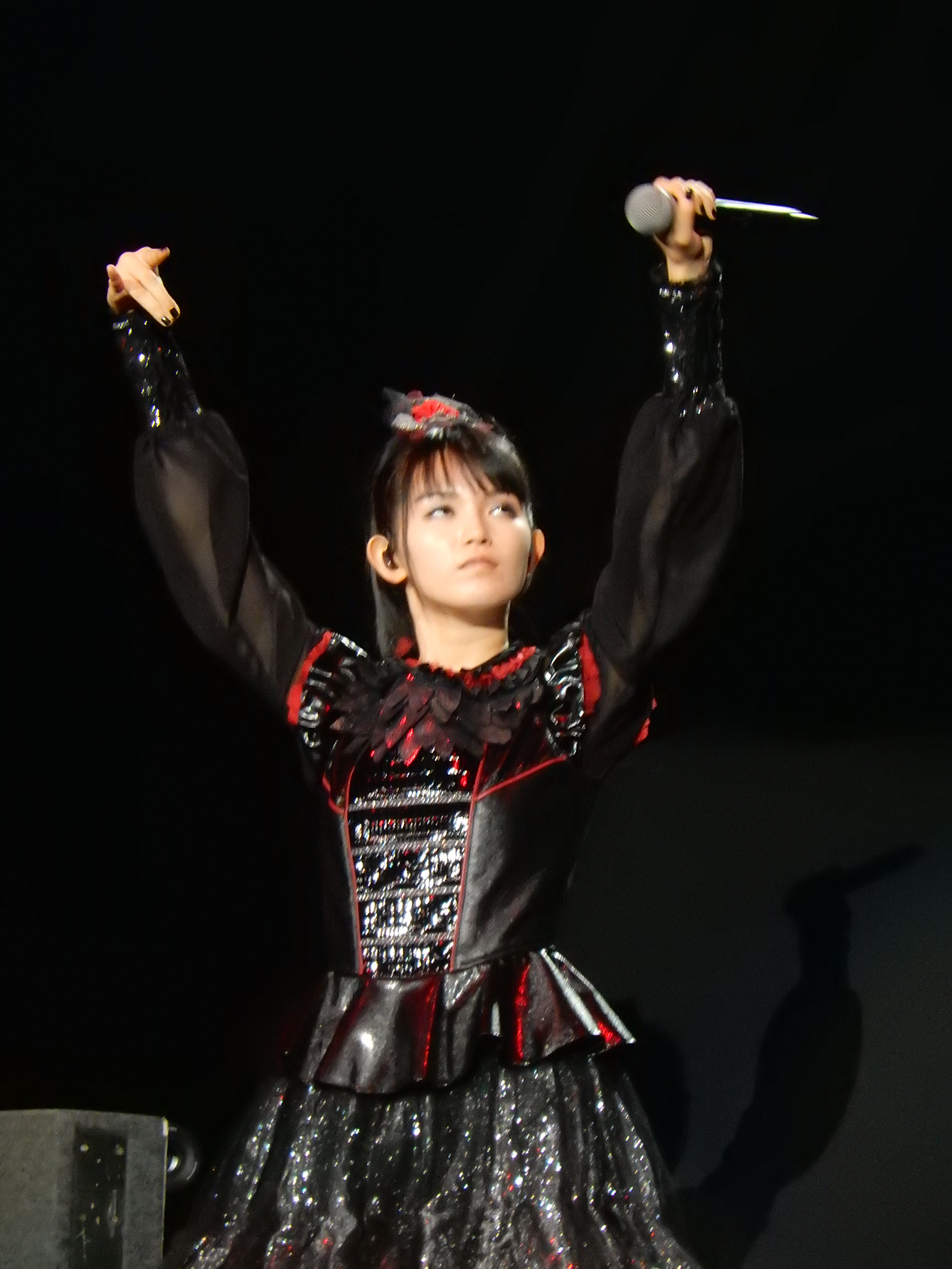 BABYMETAL, O2 Arena, London